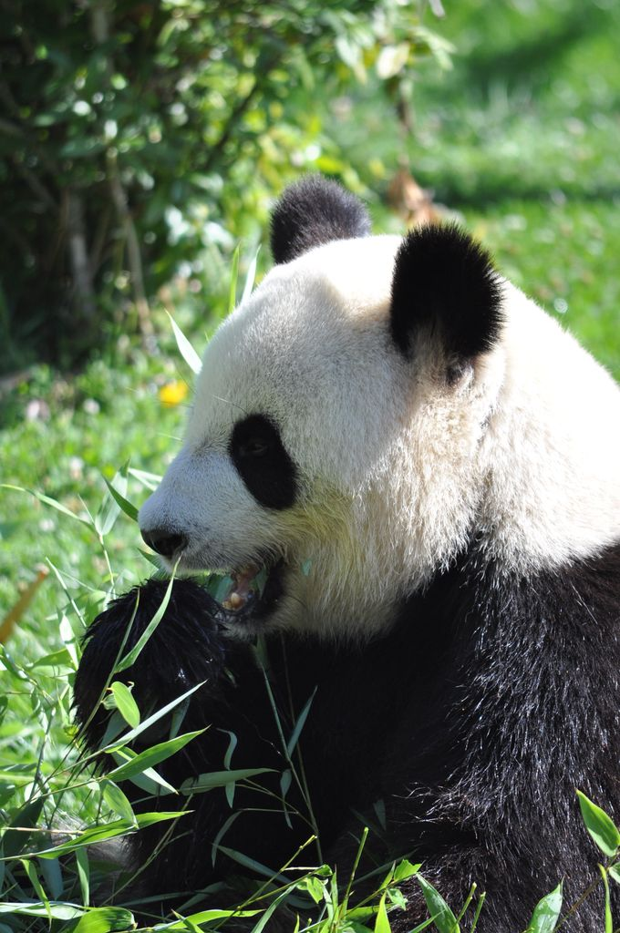 Panda au zoo de Beauval